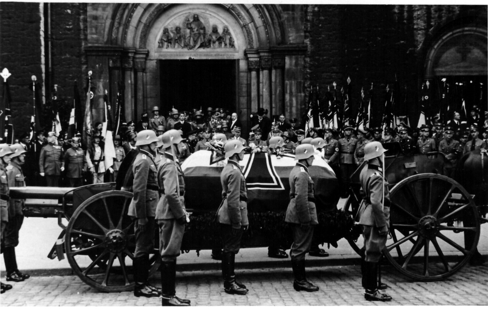 Staatsbegräbnis Alexander v. Linsingen 08.06.1935, Ansicht vor der Garnisonkirche